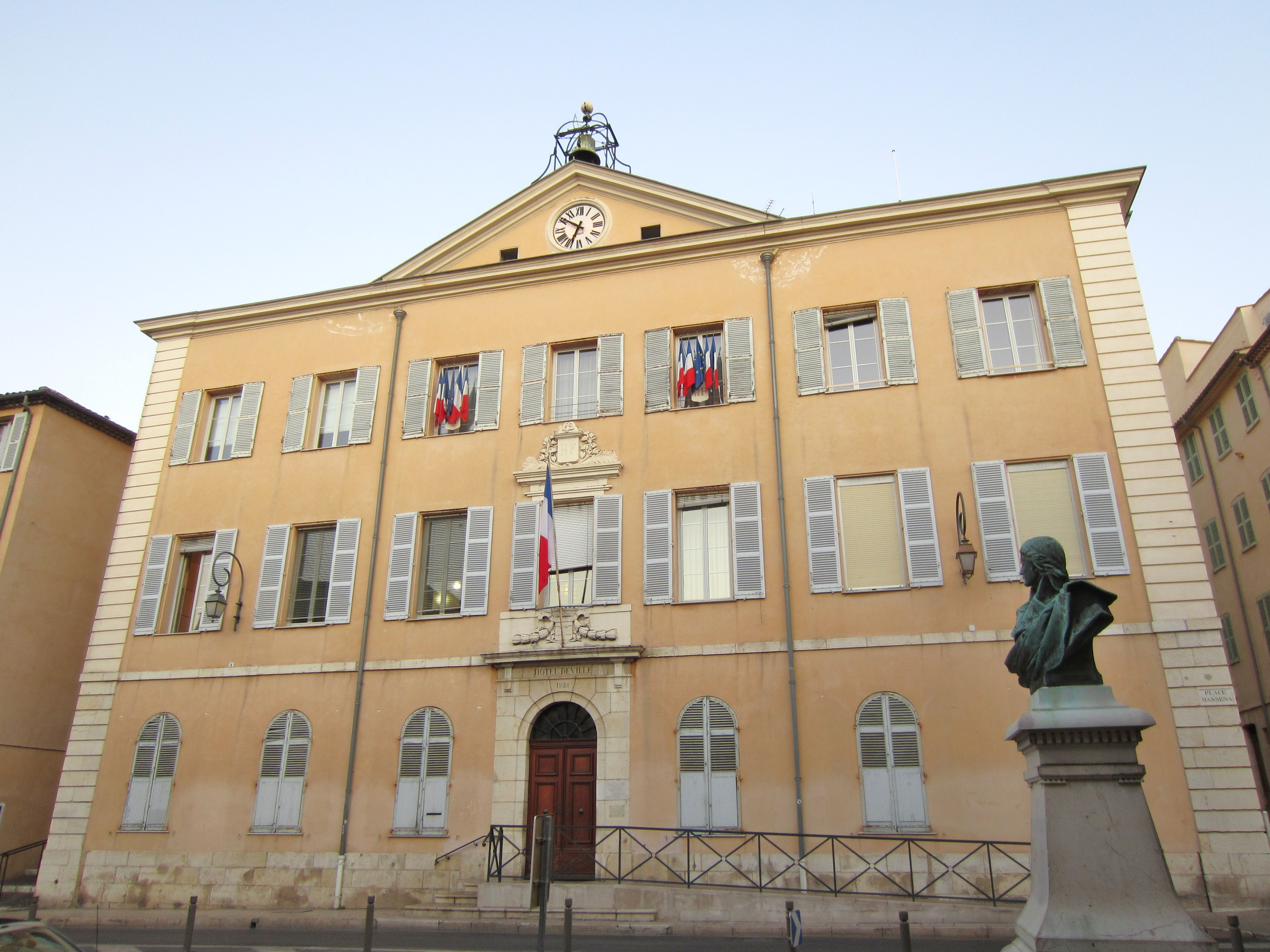 Description mairie Antibes mairie Antibes